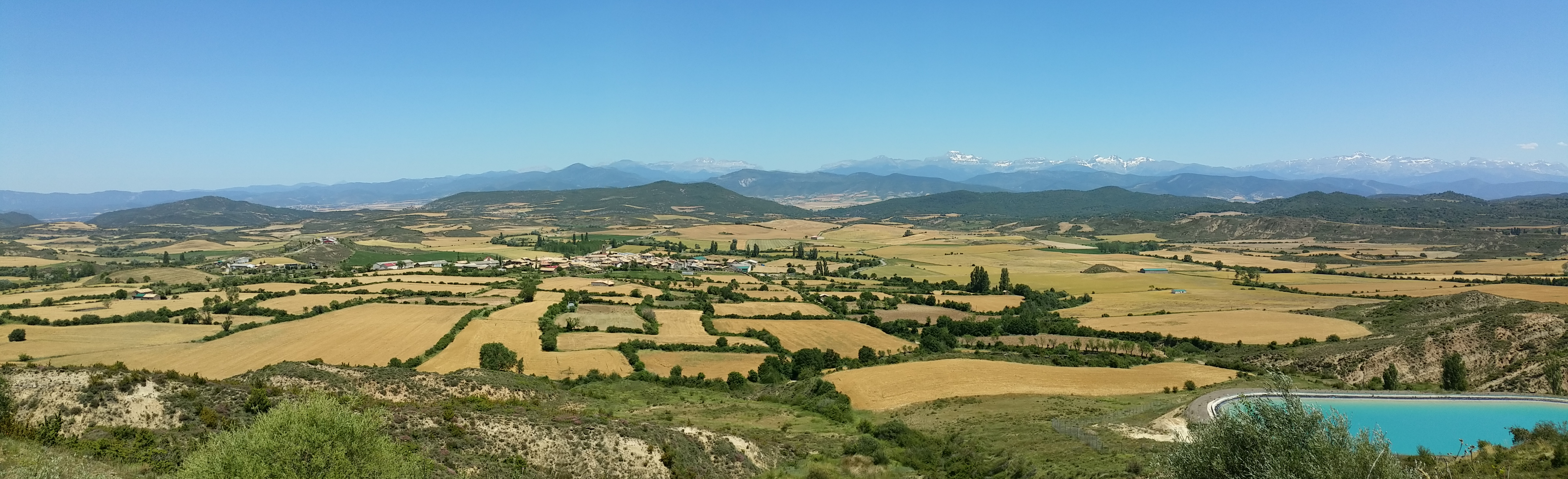 Bailo visto desde el puerto de Santa Bárbara, con los Pirineos al fondo.